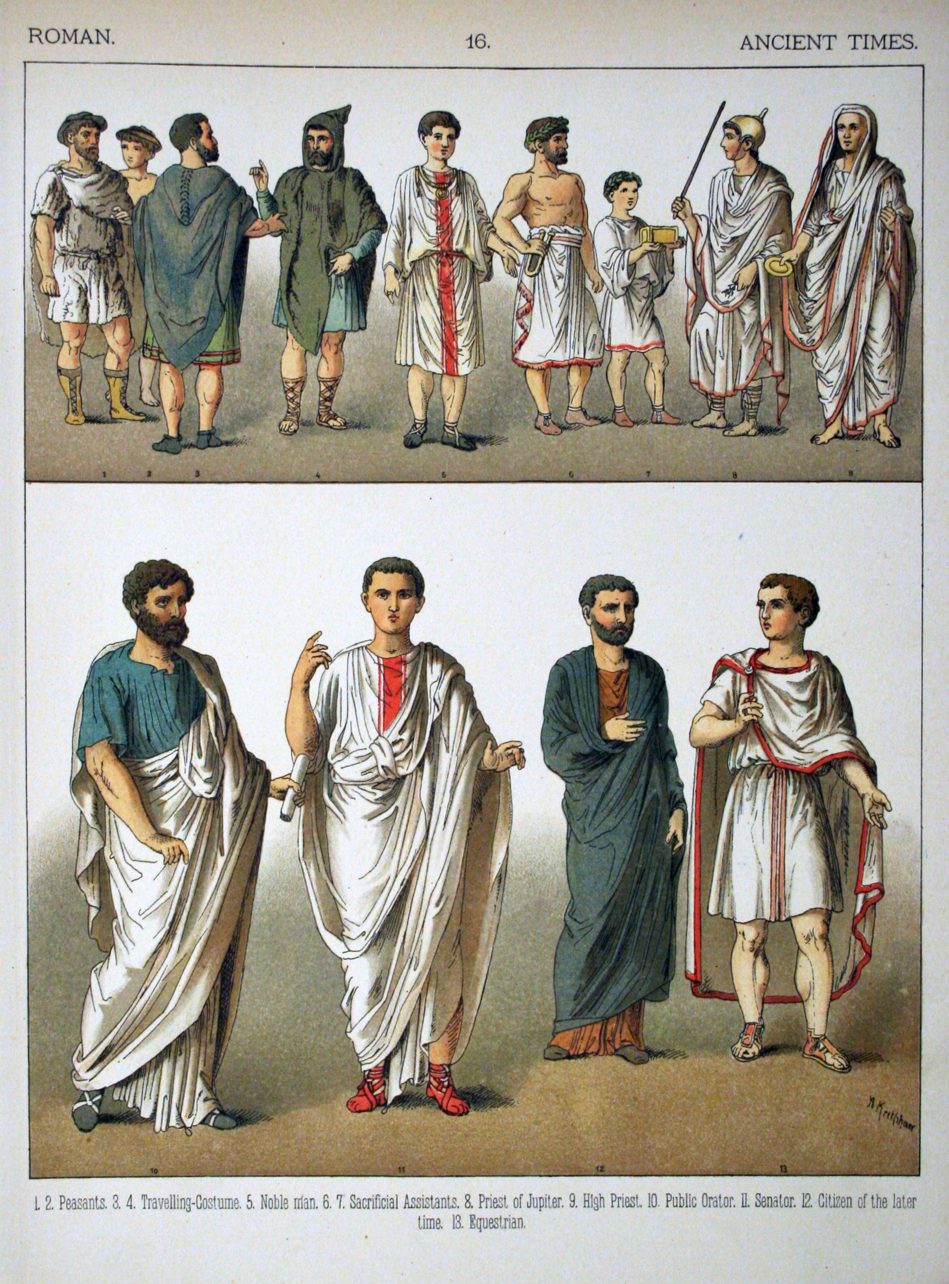 Ancient Times, Roman